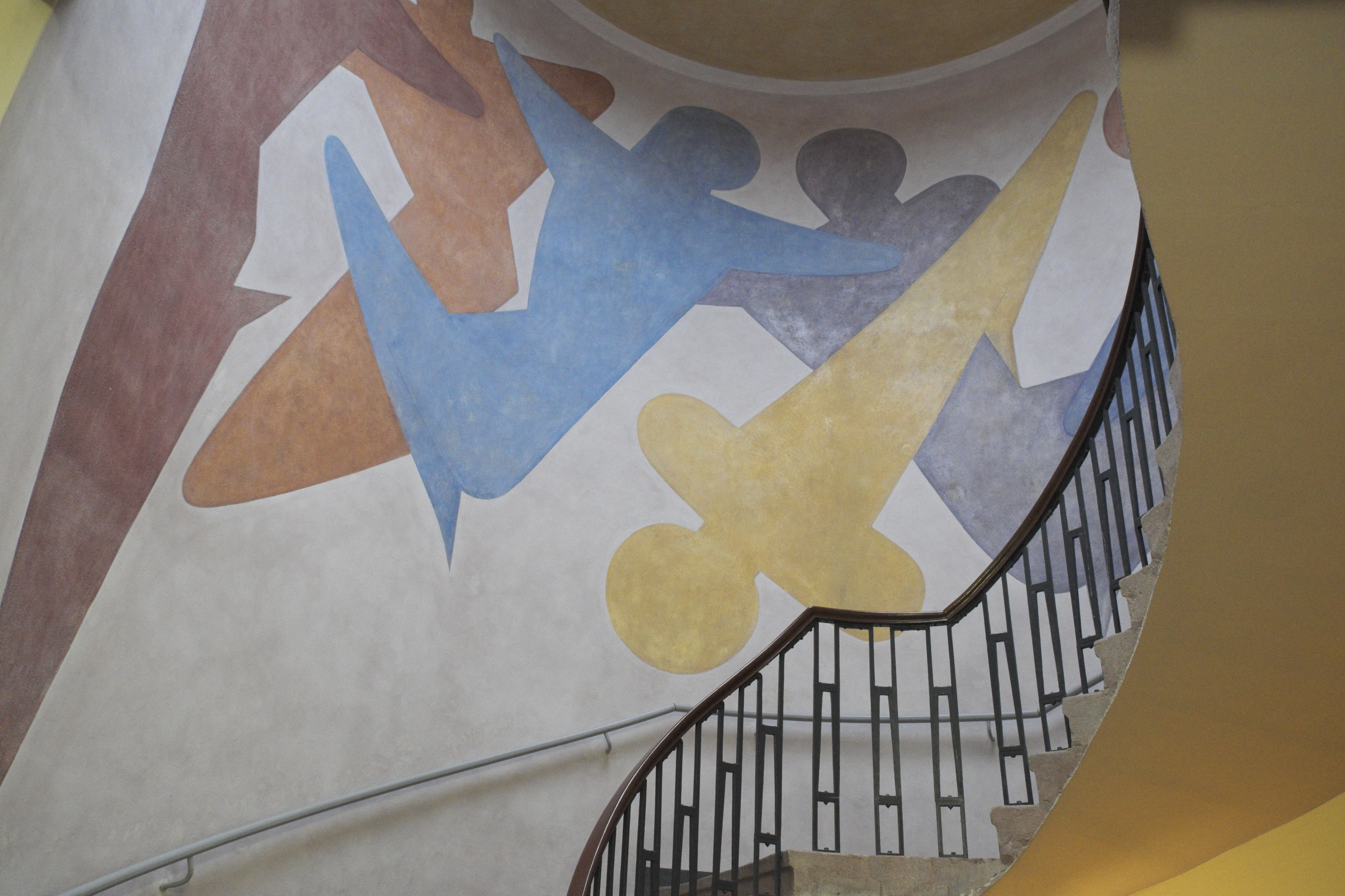 Kunstgewerbeschule in Weimar (Thüringen/Deutschland), 1906 nach Plänen von Henry van de Velde errichtet, Wandmalerei im Treppenhaus von Oskar Schlemmer von 1923 (1979 rekonstruiert)